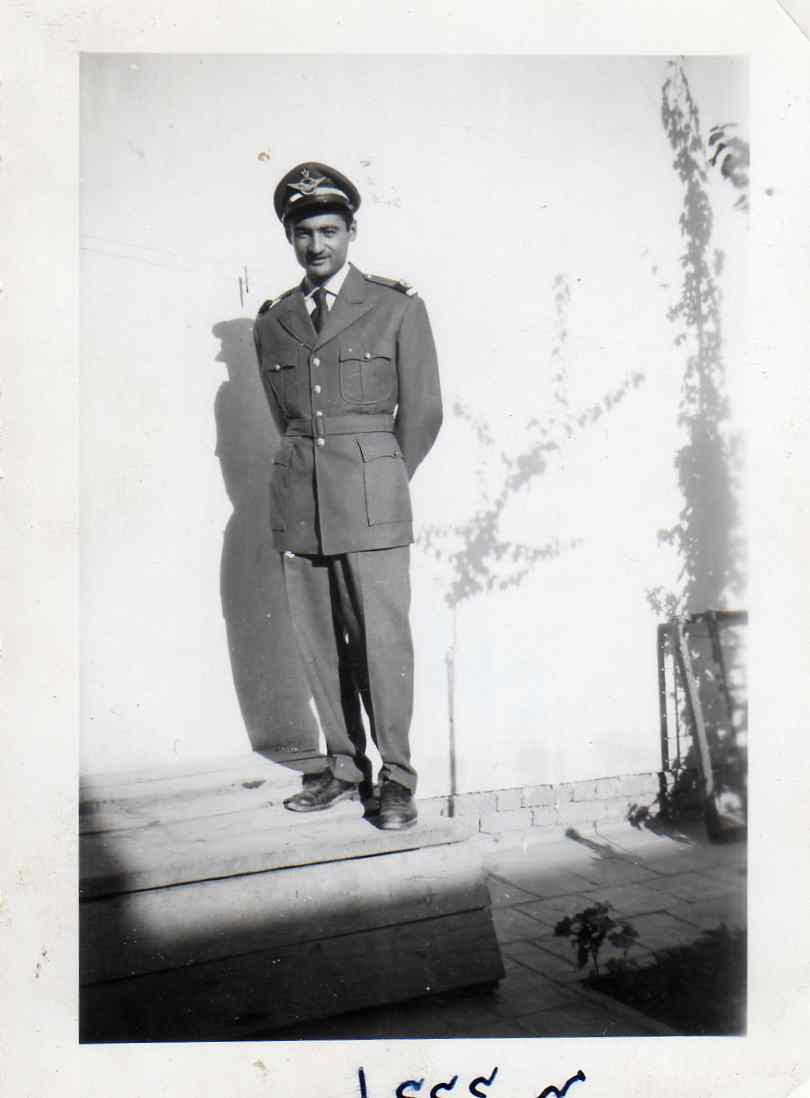 اصغر ایمانیان-مهرماه 1333- فارغ التحصیل از دانشکده افسری با درجه ستوان دومی